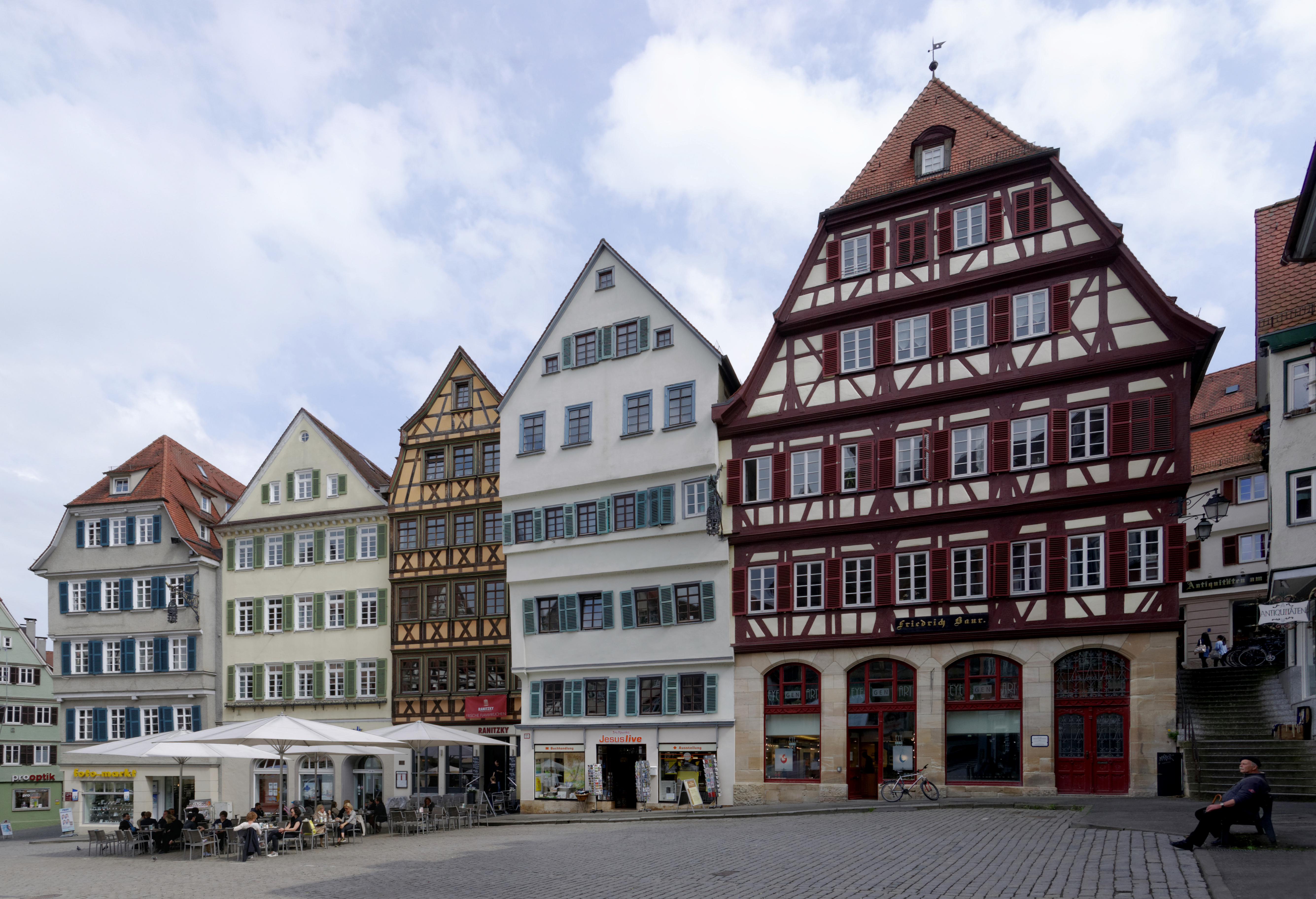 Tübingen, Markt, Südost Seite